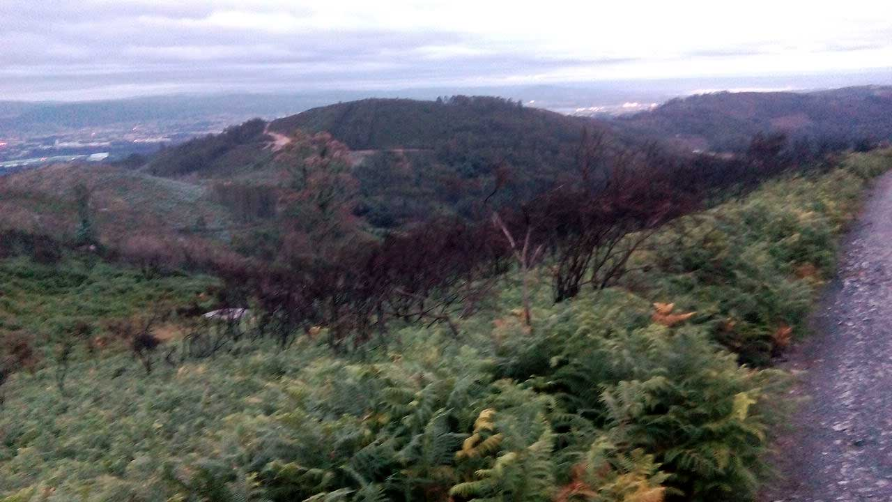 Vista da Espiñeira, O Val.